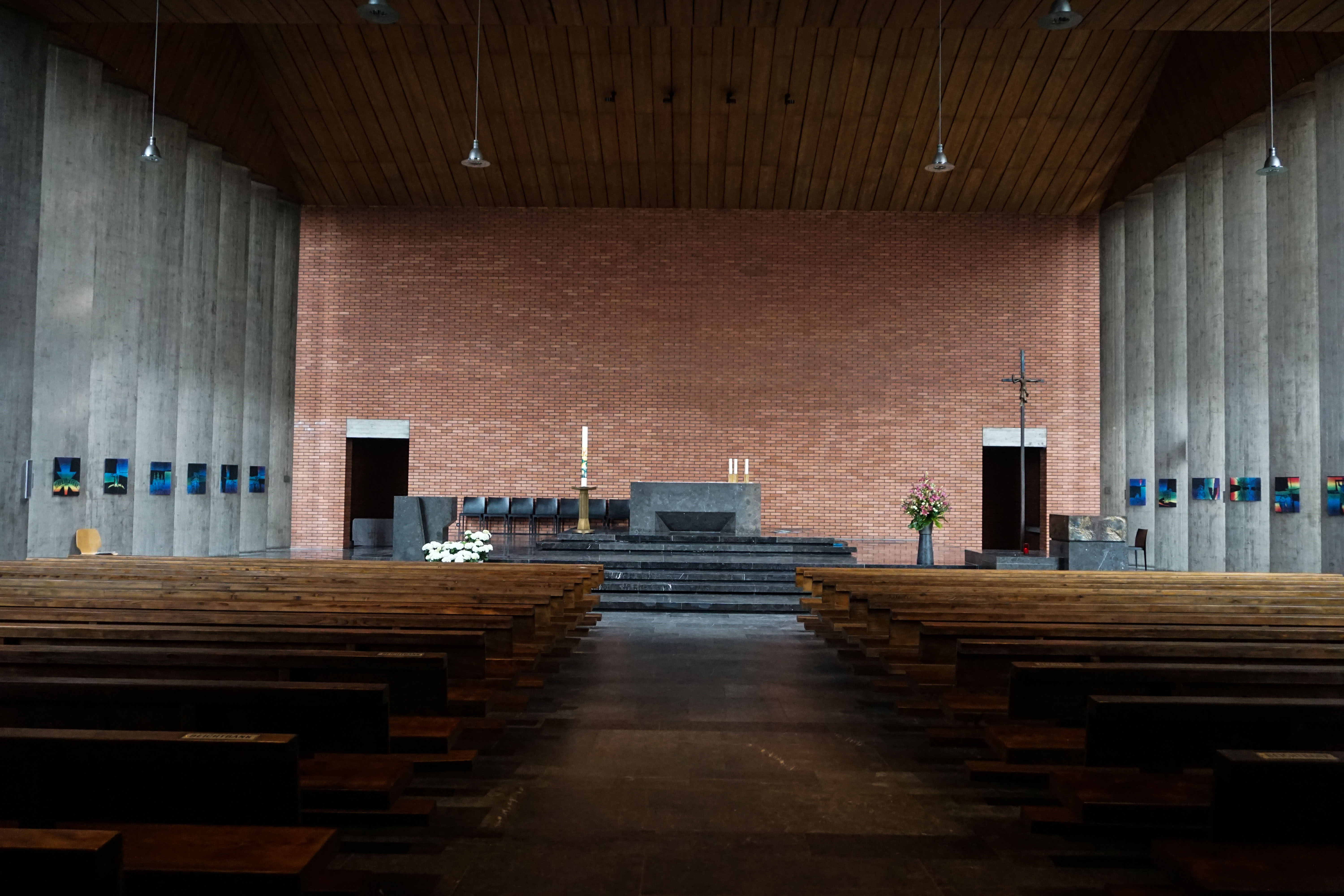 Innen, Schiff mitte